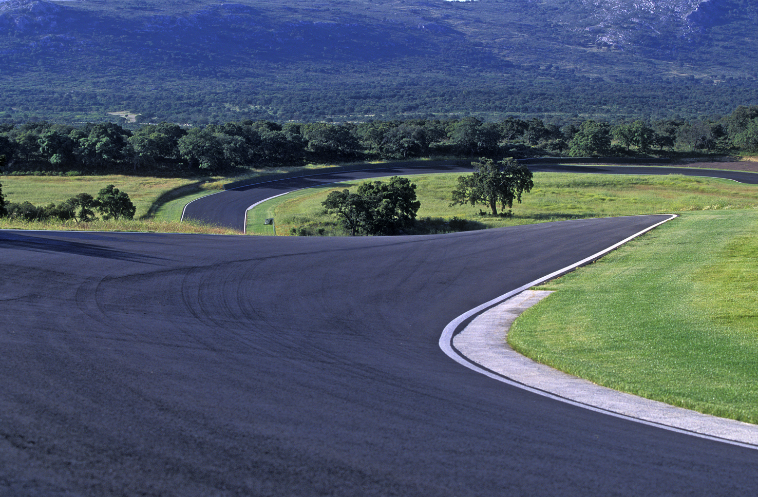 Uno de los tramos de la pista del Circuito Ascari